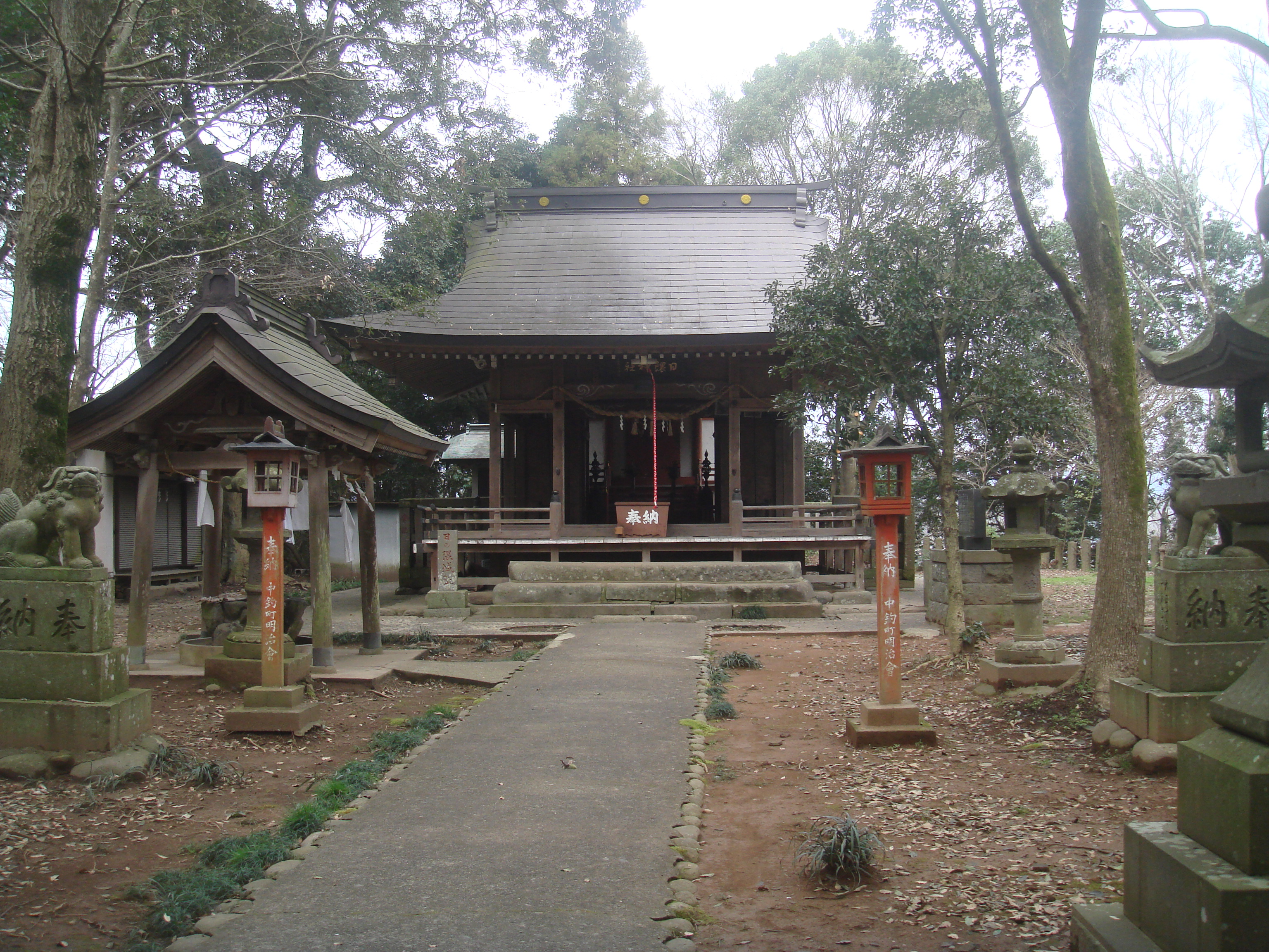 亀山公園山頂の日隈城本丸跡。正面の建物は日隈神社の拝殿である。